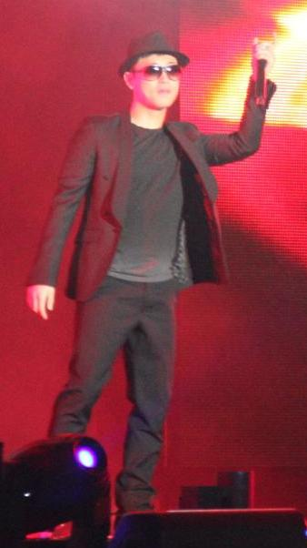 싸이월드 페스티벌